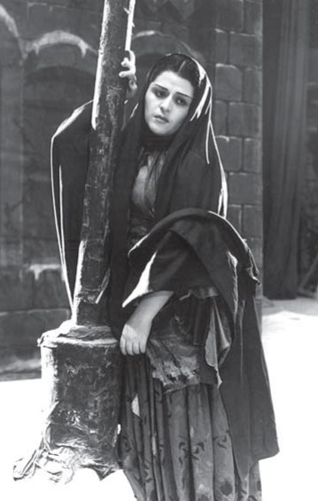 Firəngiz Əhmədova Sevil operasında Sevil rolunda, 1959, Baku